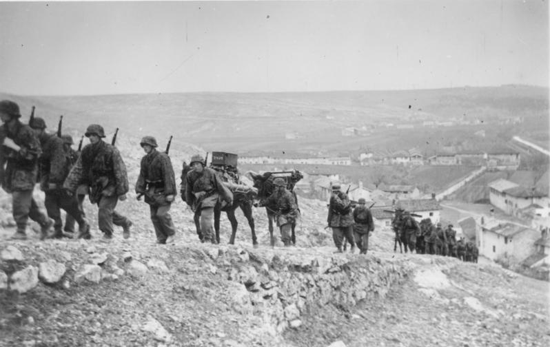 Die Karstschulungsstätte Pottenstein/Oberfranken Ein Bilderatlas mit Erläuterungen Zusammengestellt von SS-Standartenführer Dr. Brand. Der Karstkampf erfordert eine geschulte, leichtbewegliche Artillerie